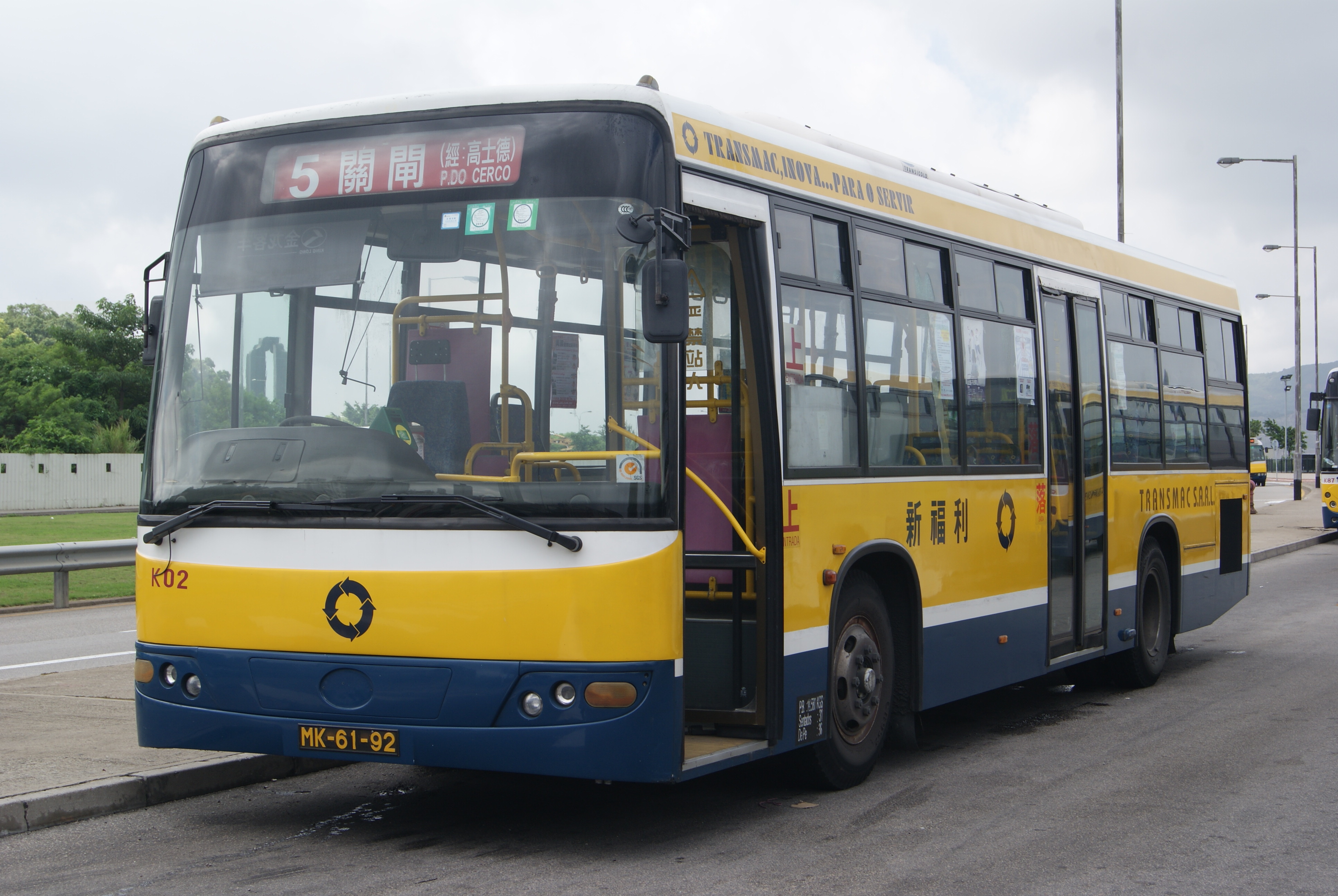 在新巴士服務模式開始前，新福利廈門金龍XMQ6103G行駛5路線。